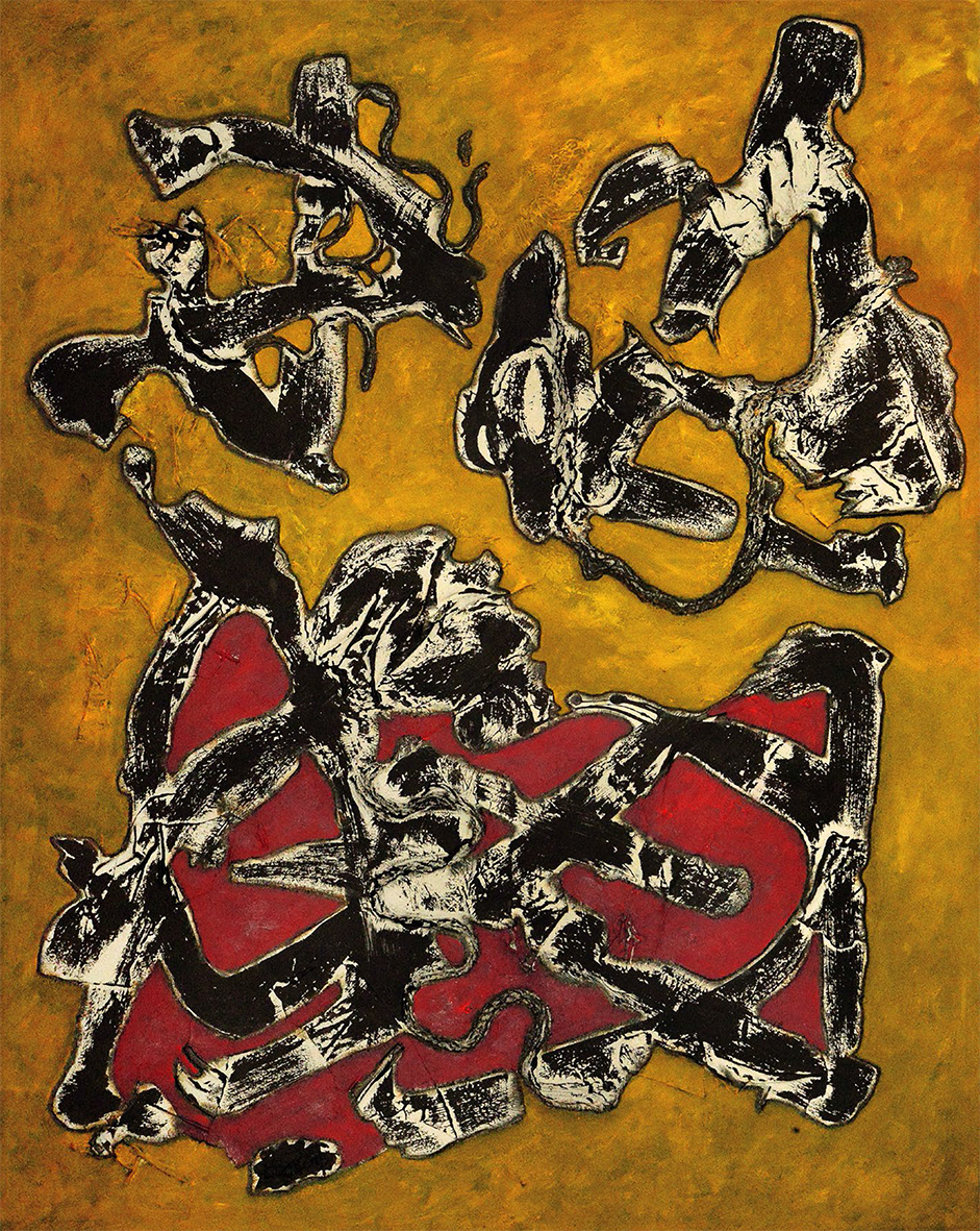 Mixed media on canvas